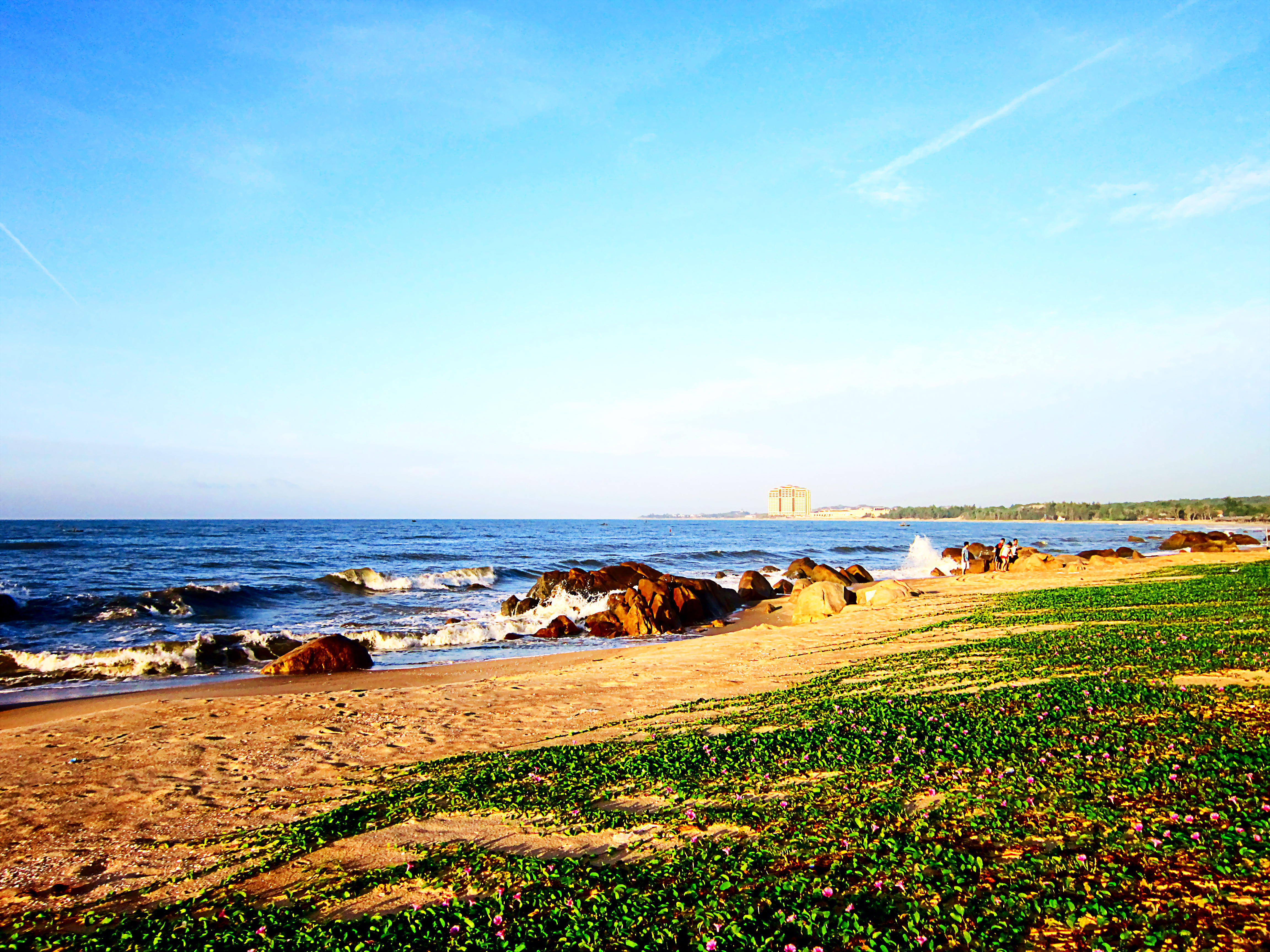 Biển ở khu nghỉ dưỡng Hồ Cóc, thuộc xã Bưng Riềng, huyện Xuyên Mộc, thành phố Bà Rịa - Vũng Tàu, Việt Nam.